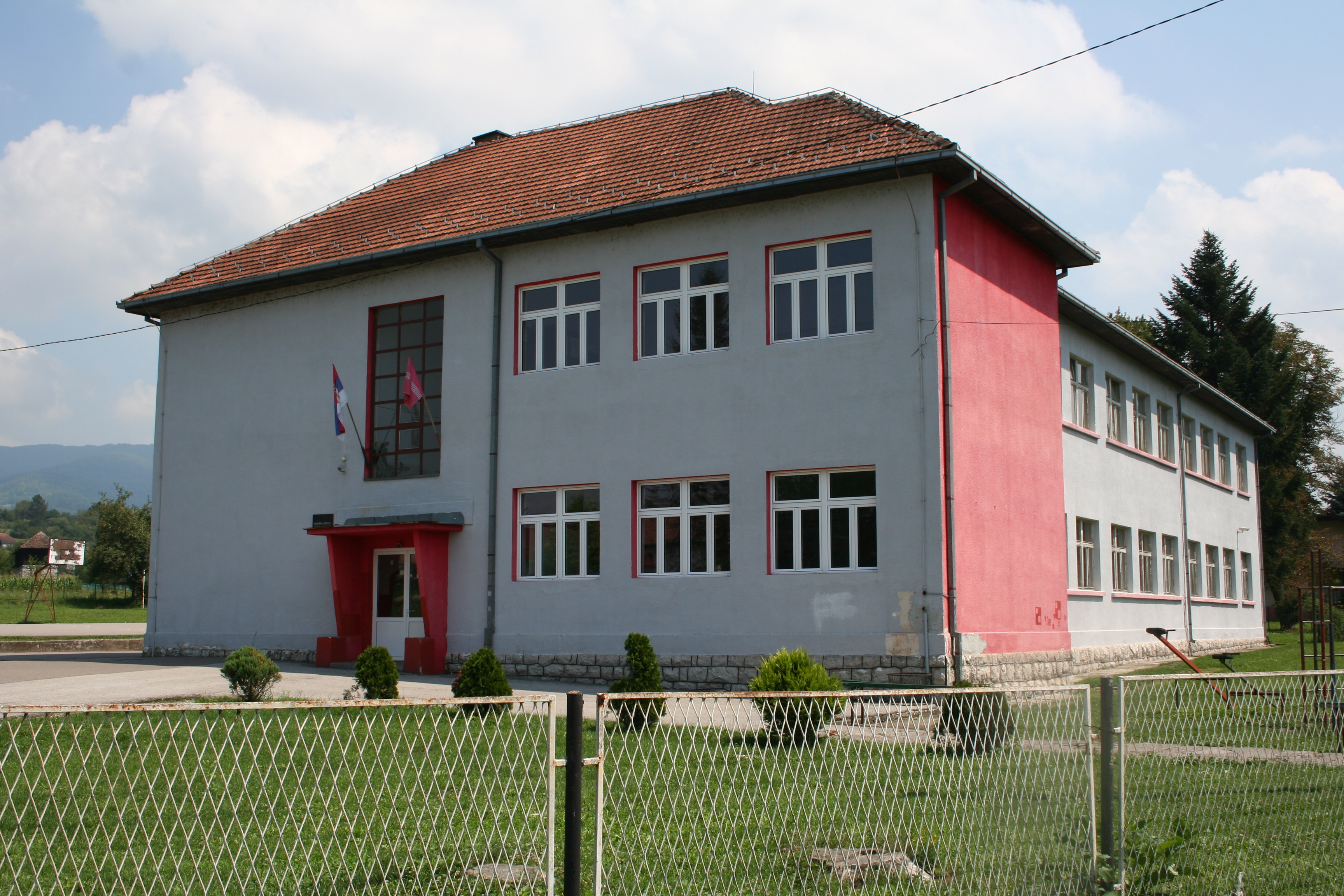 Osnovna škola "Braća Ribar" Donja Borina